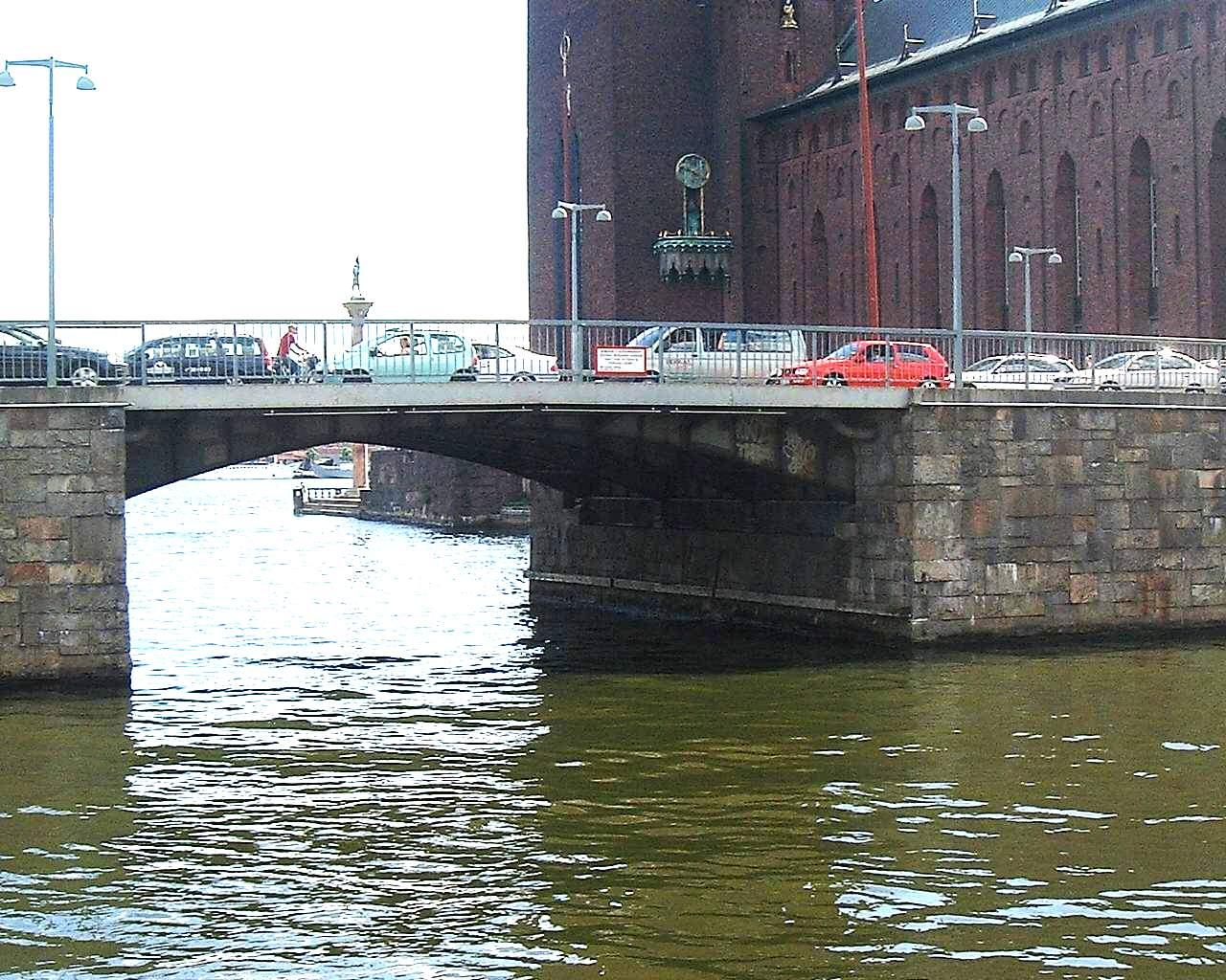 Stadshusbron, Stockholm.